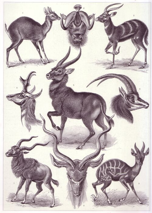 Antilopen, Tafel ausErnst Haeckel: "Kunstformen der Natur", 1904; gemeinfrei